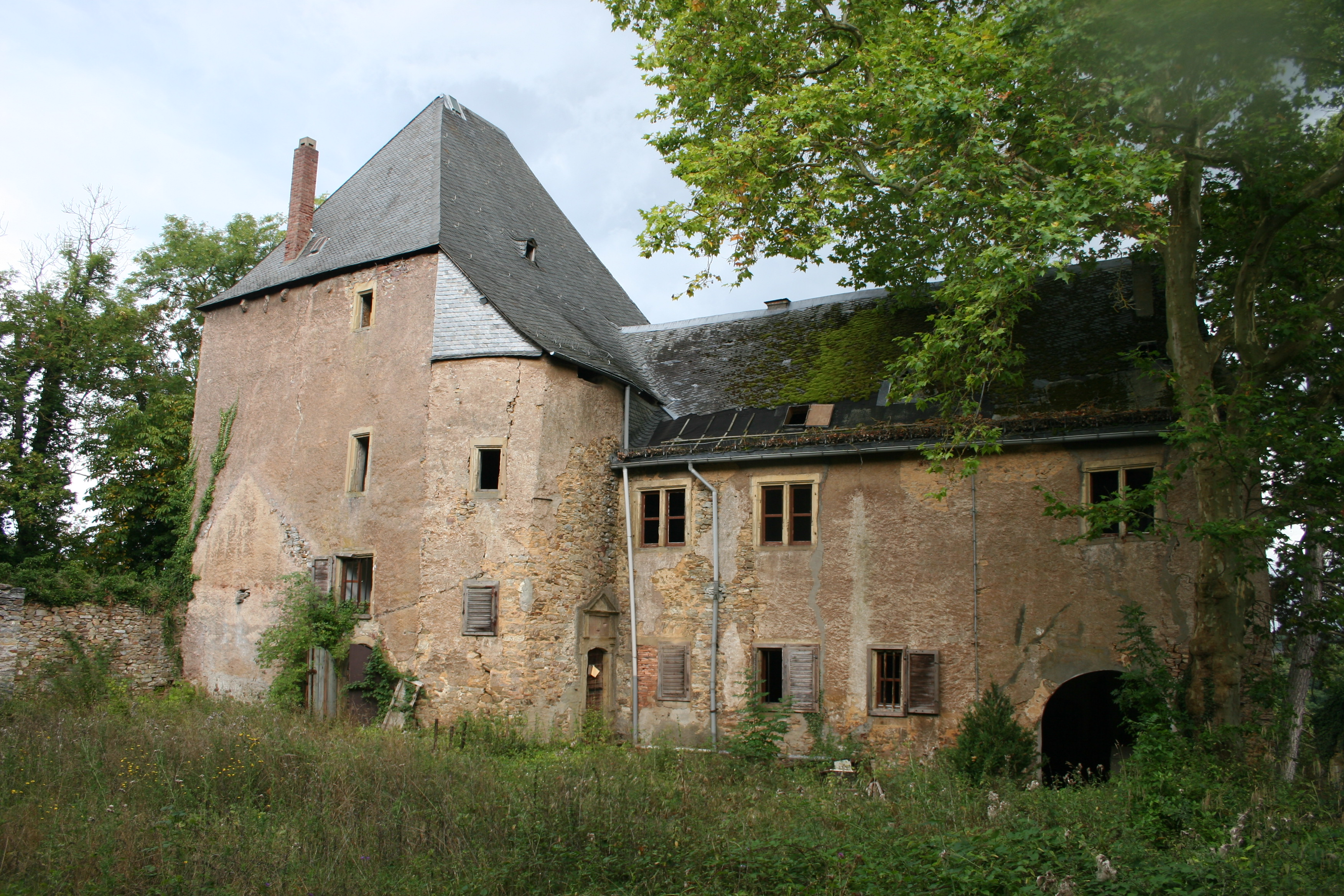 Burg Gollenfels, Hauptgebäude